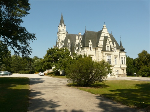 budmerický kaštieľ